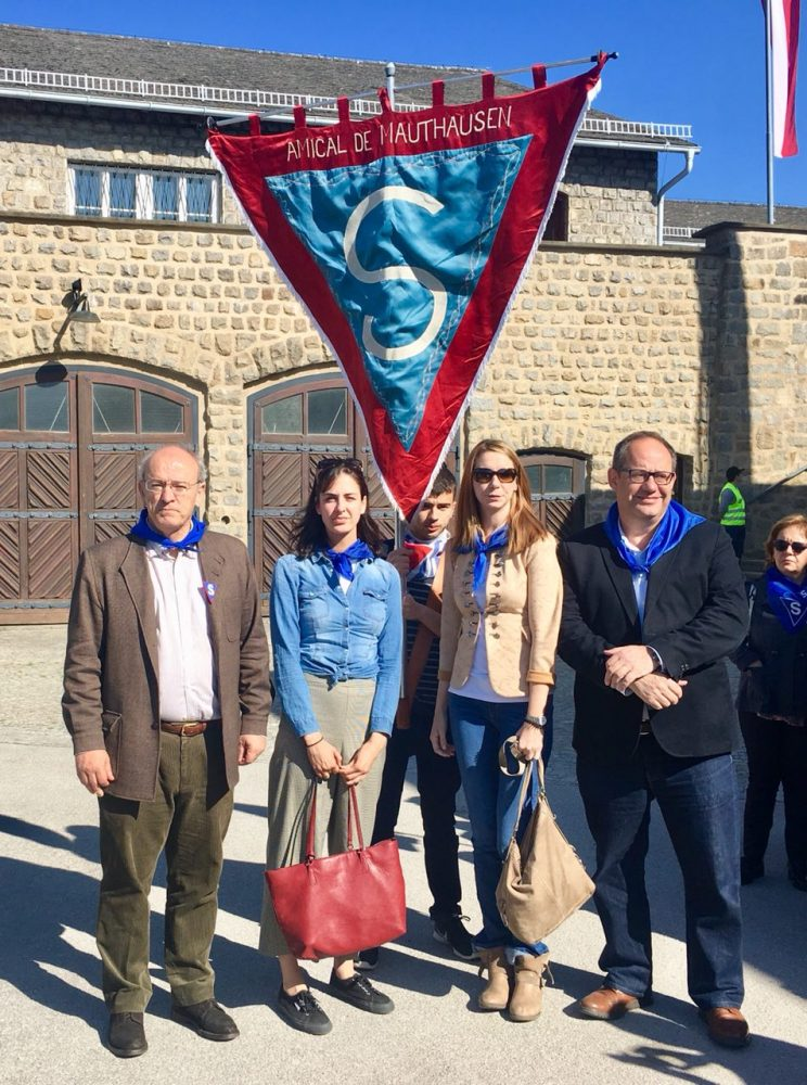 El Ayuntamiento de Madrid recuerda el horror de los campos nazis. Estos días una delegación municipal asiste a los homenajes a las víctimas del exterminio, coincidiendo con la liberación de Mauthausen en mayo de 1945. Al acto –organizado por Amical de Mauthausen y Red Nunca Más- han asistido la portavoz del Gobierno municipal, Rita Maestre, junto al resto de la delegación en Austria e integrada por Mar Espinar y Ramón Silva (PSOE) y Pedro Corral (PP)